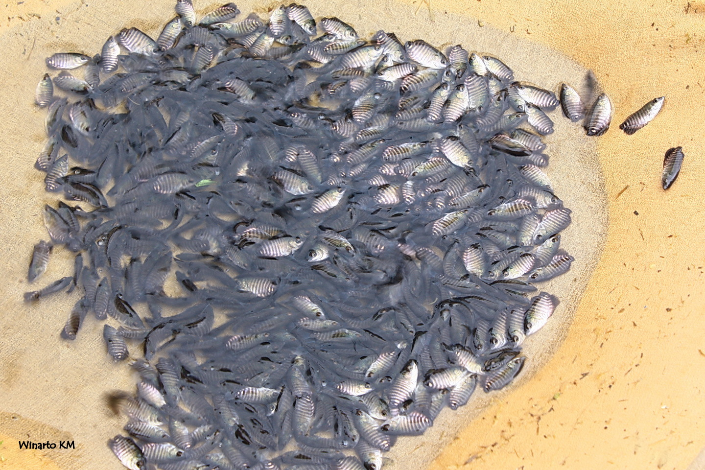 Benih gurami usia 40-50 hari